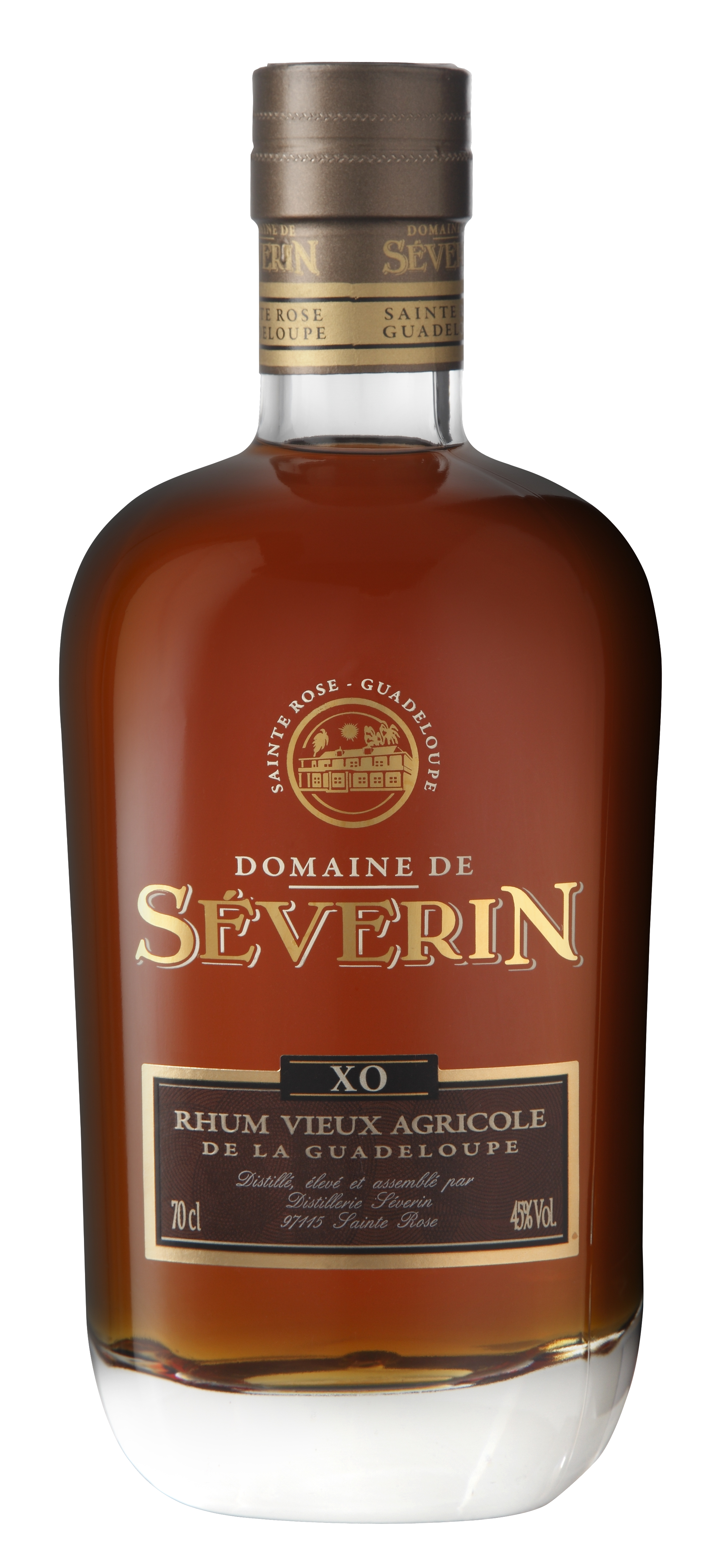 Notre XO (Extra Old) est le résultat d'un assemble de nos meilleurs rhum vieux agricole. Le plus jeune ayant, réglementairement, 6 ans d'âge minimum.